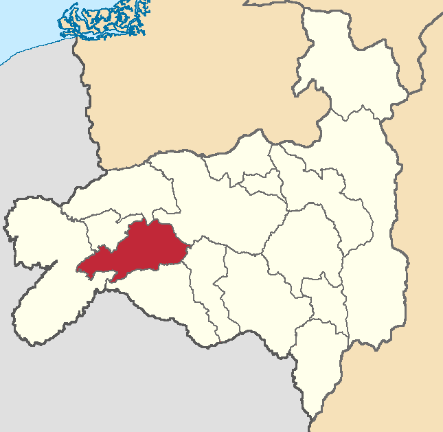 Mapa localizador del cantón en Loja, Ecuador